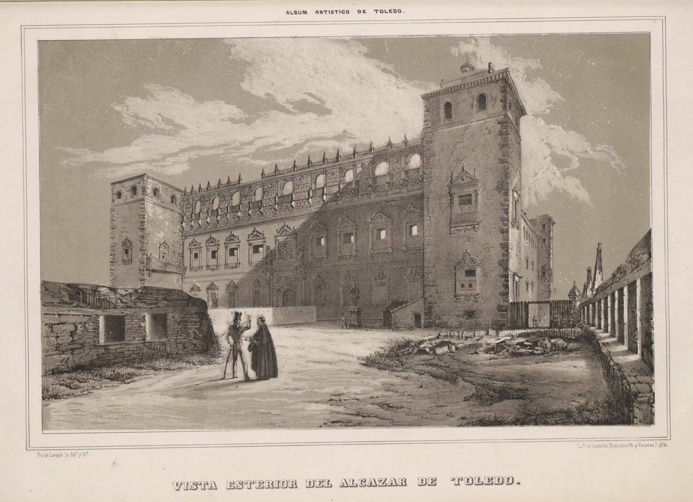 Vista exterior del Alcázar de Toledo.